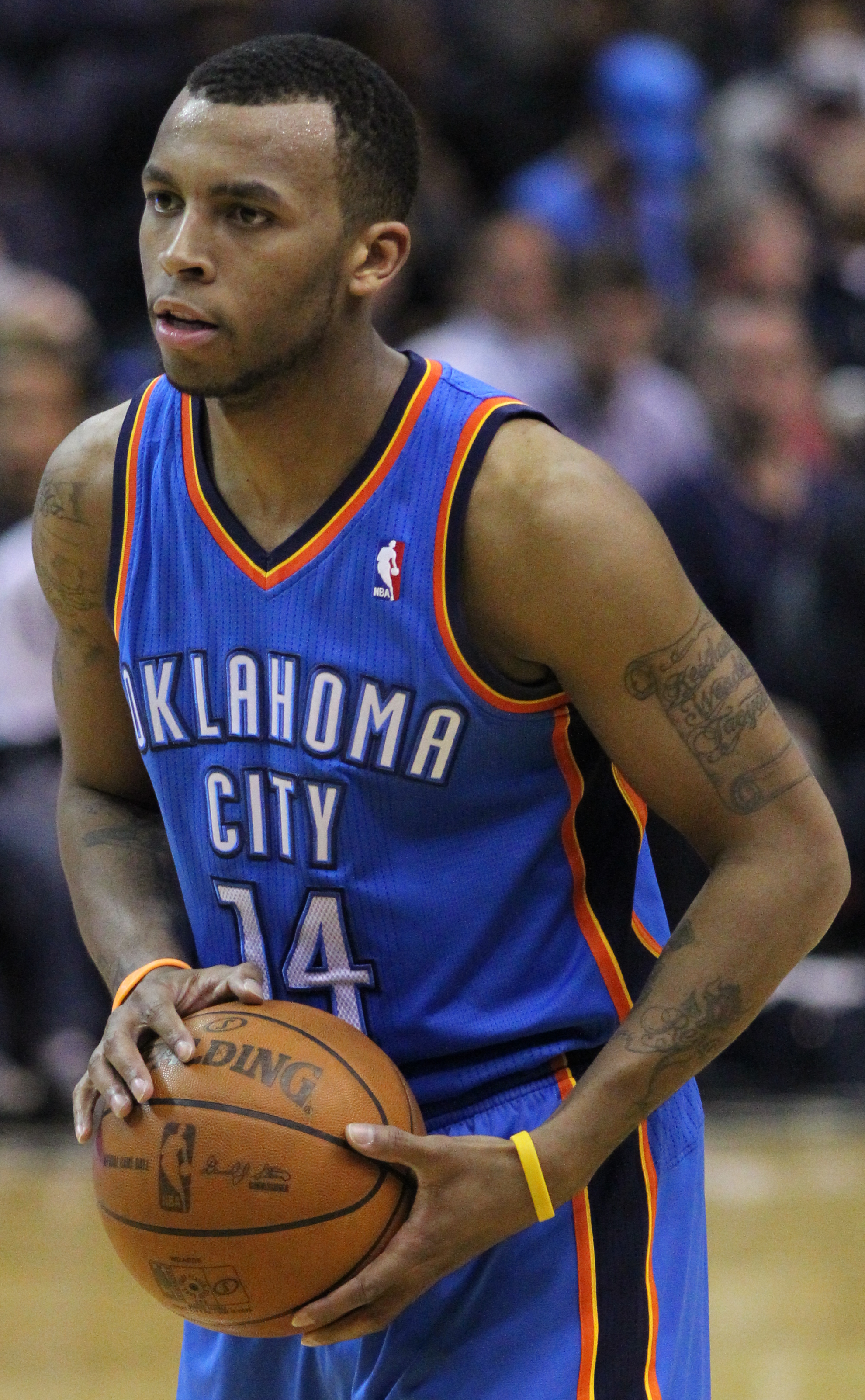 Wizards v/s Thunder 03/14/11